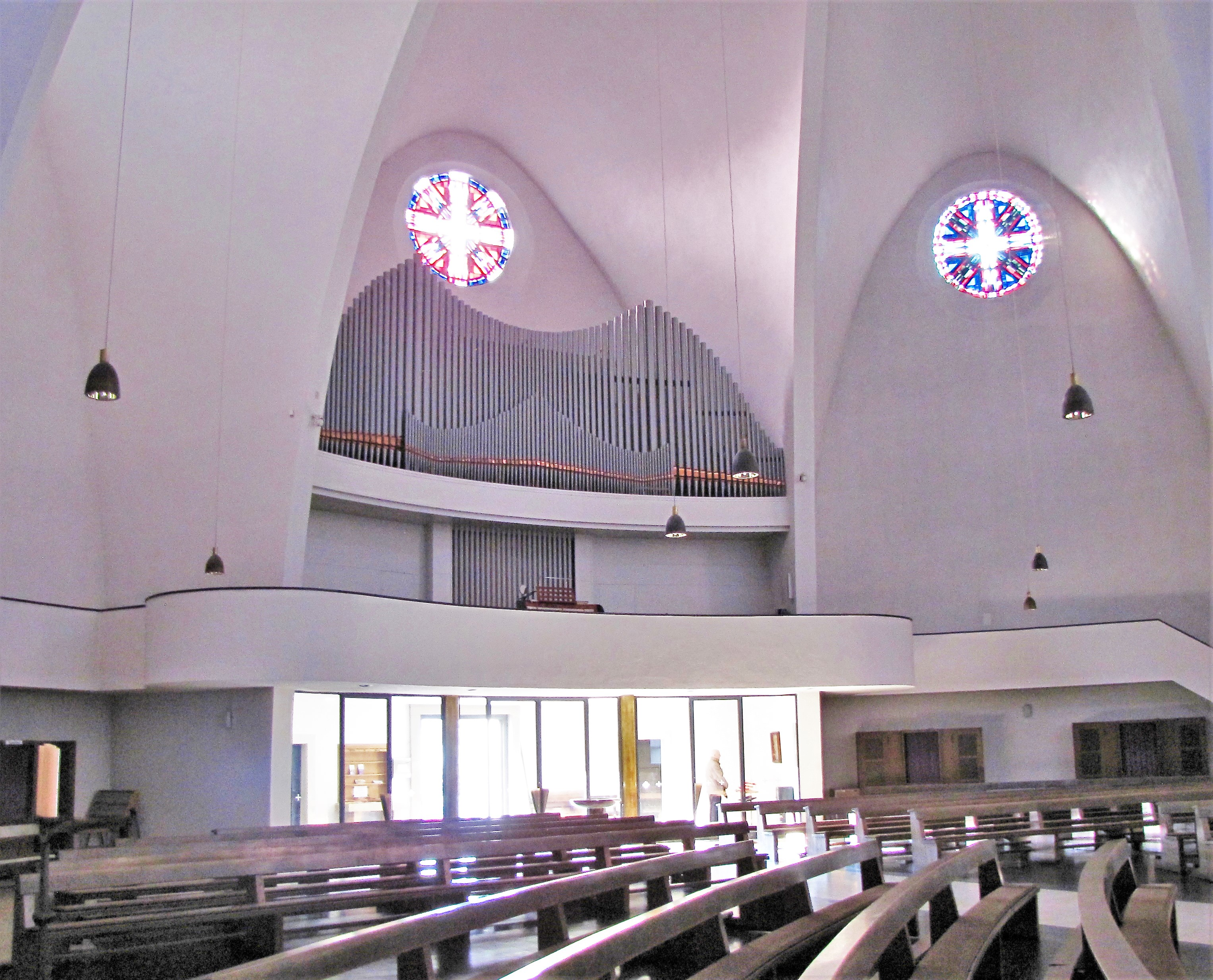 St. Engelbert (Köln-Riehl): Orgelempore mit geschwungenen Treppen- und Brüstungsläufen